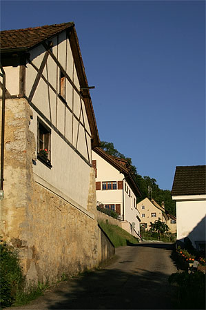 Dorfweg in Burg im Leimental